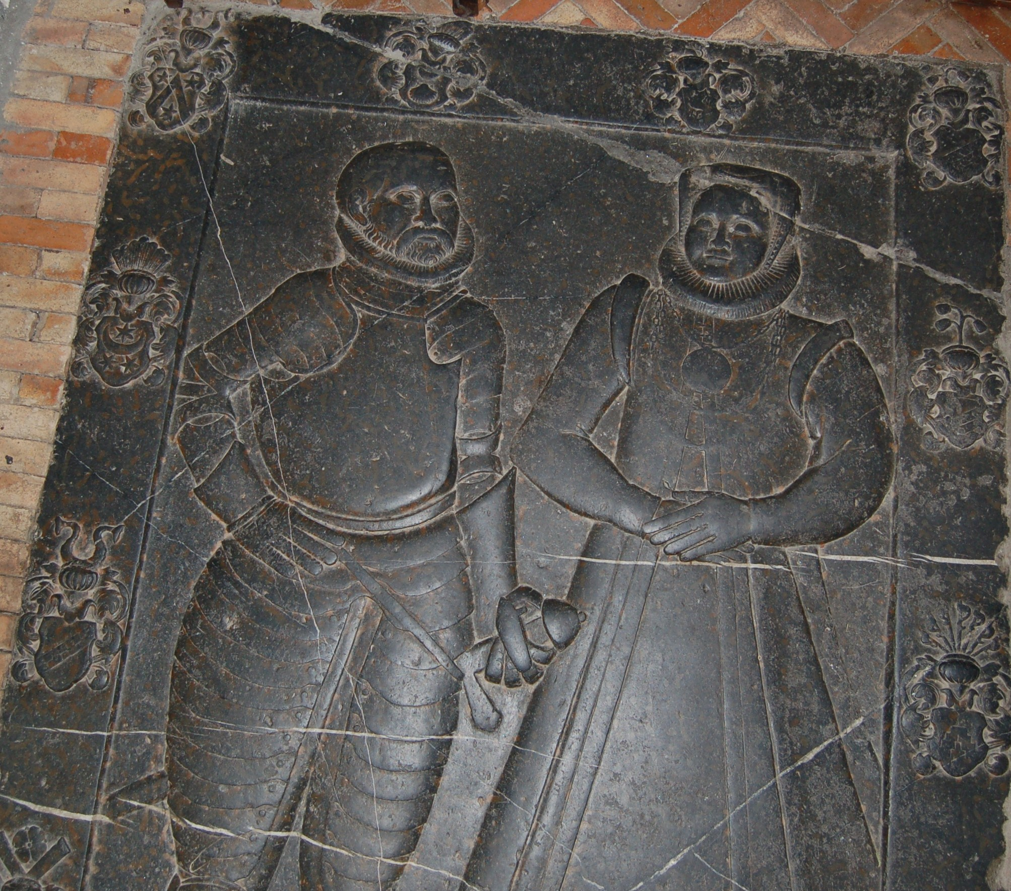 Gravplata tilhørende Peder Iversøn til Fresje og Margrete Breide - Hedrum kirke